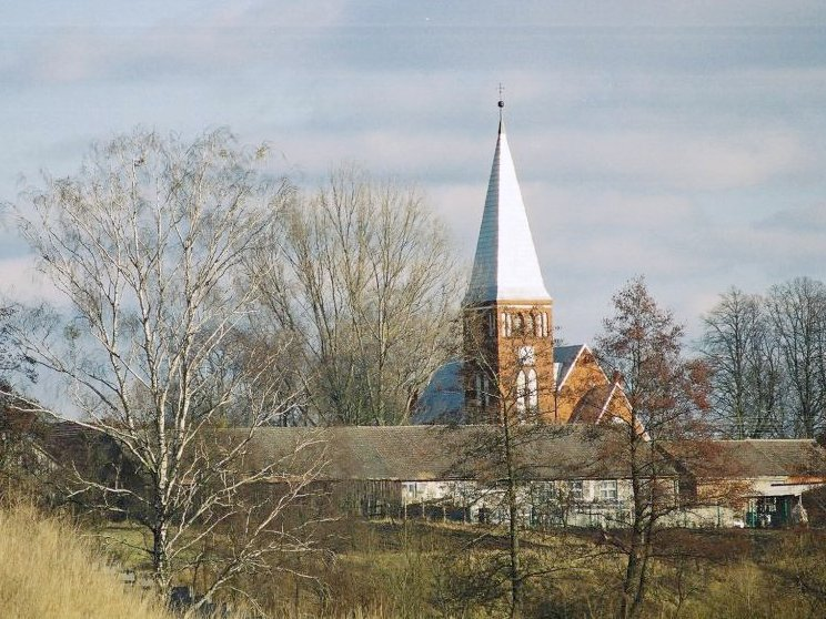 Kłodawa - zdjęcie wieży kościoła.